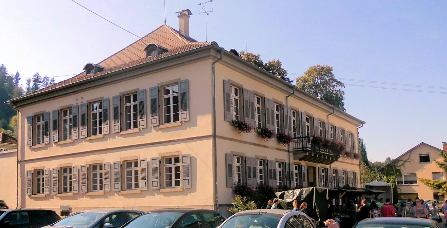 Rathaus der Stadt Sulzburg